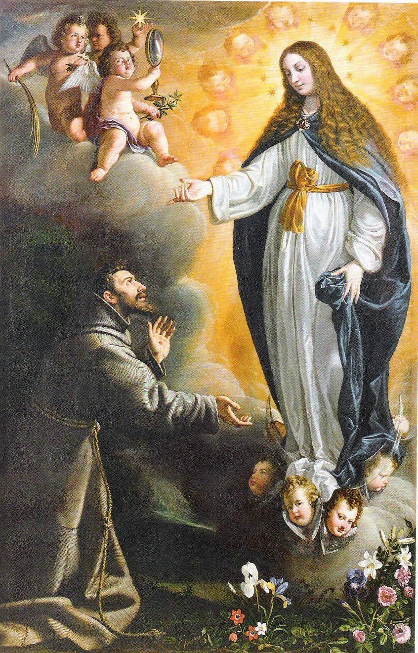 La obra muestra a la Virgen María, madre de Jesucristo, apareciéndose a San Francisco de Asís, fundador de la Orden de los Franciscanos.